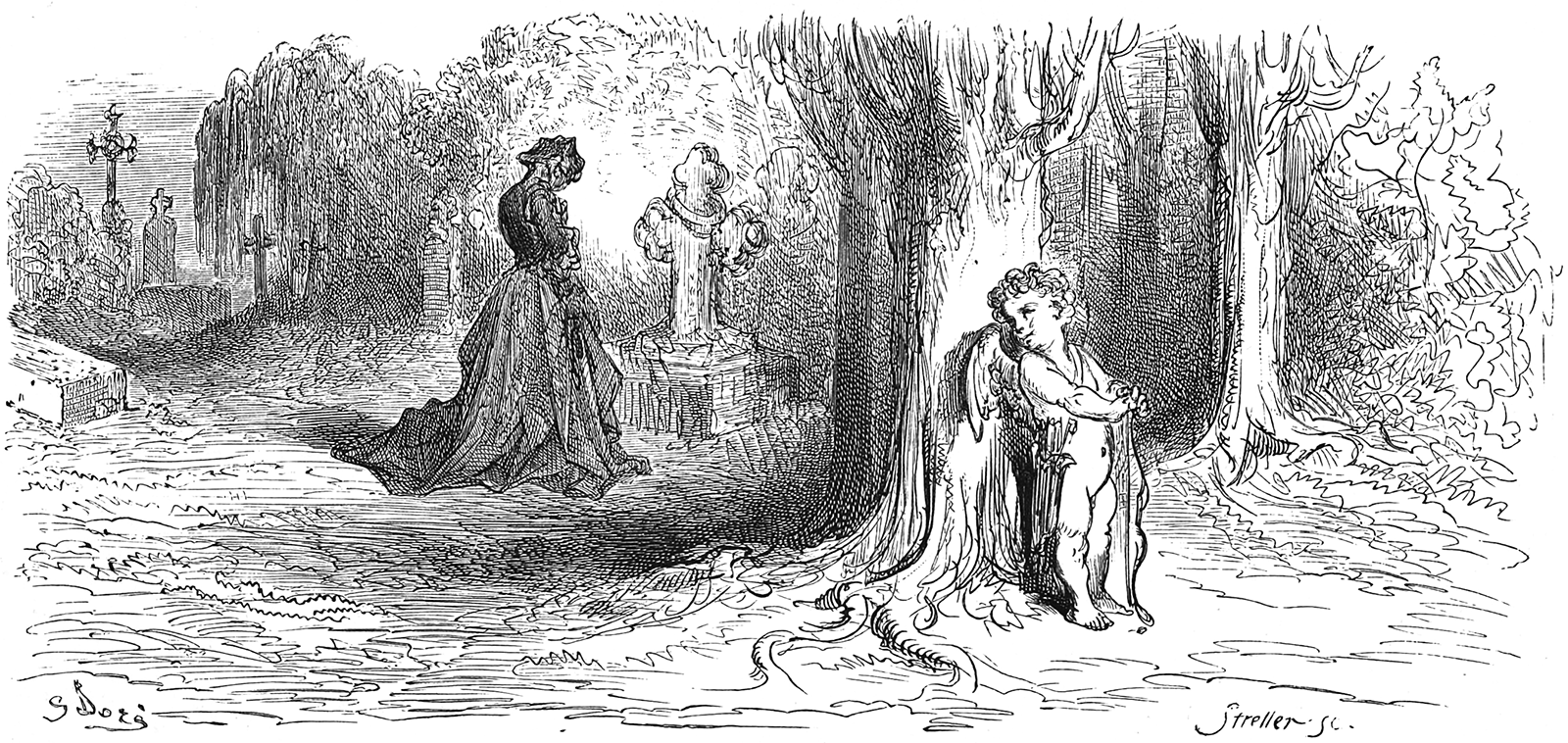 grafika z książki PL Bajki, Jean de La Fontaine, nakładem i drukiem Jana Noskowskiego, Warszawa 1876